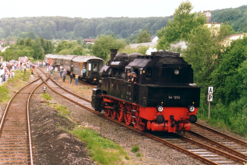 94 1292 am 30.05.1993 in Breitscheid